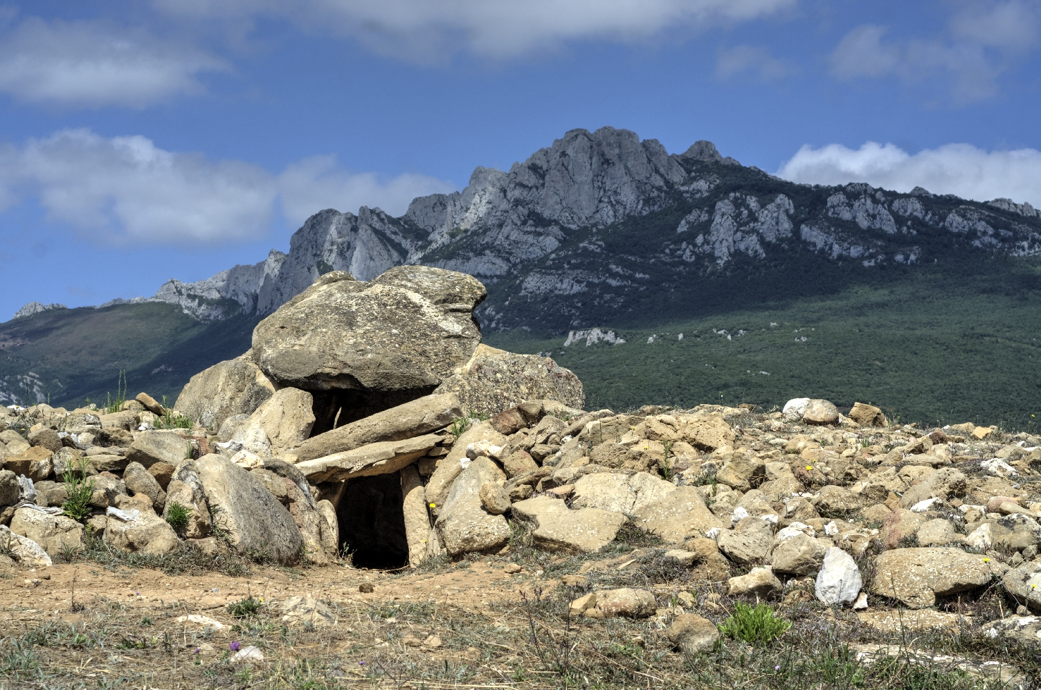 El dolmen del Alto de la Huesera en el municipio Laguardia, Álava. Fue descubierto en 1947.